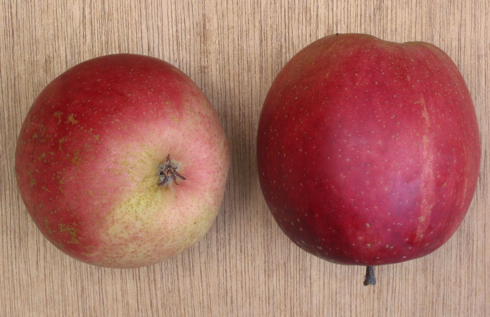 Summerred apple